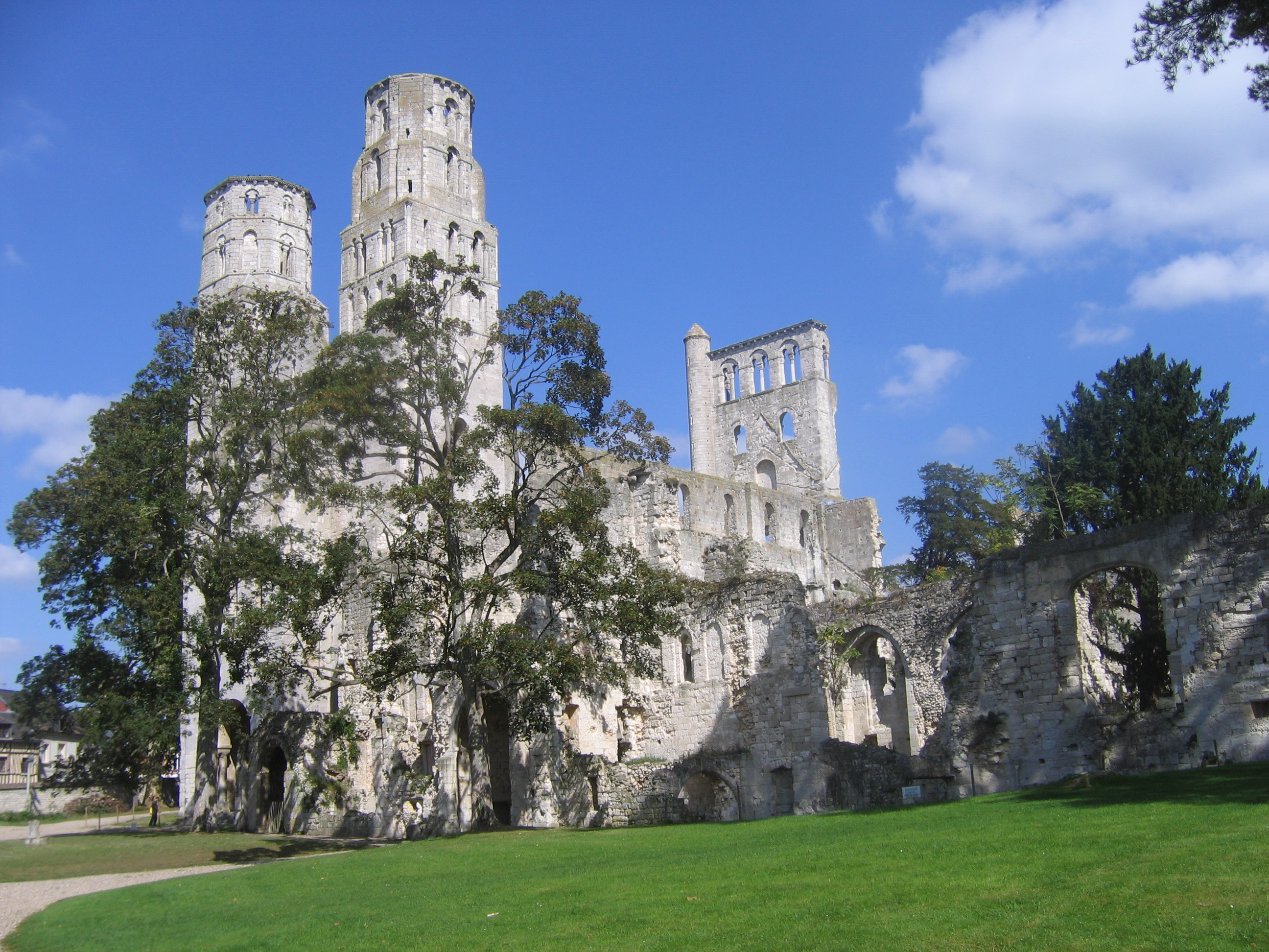 Abbaye de Jumièges, Seine-Maritime, Haute-Normandie, France